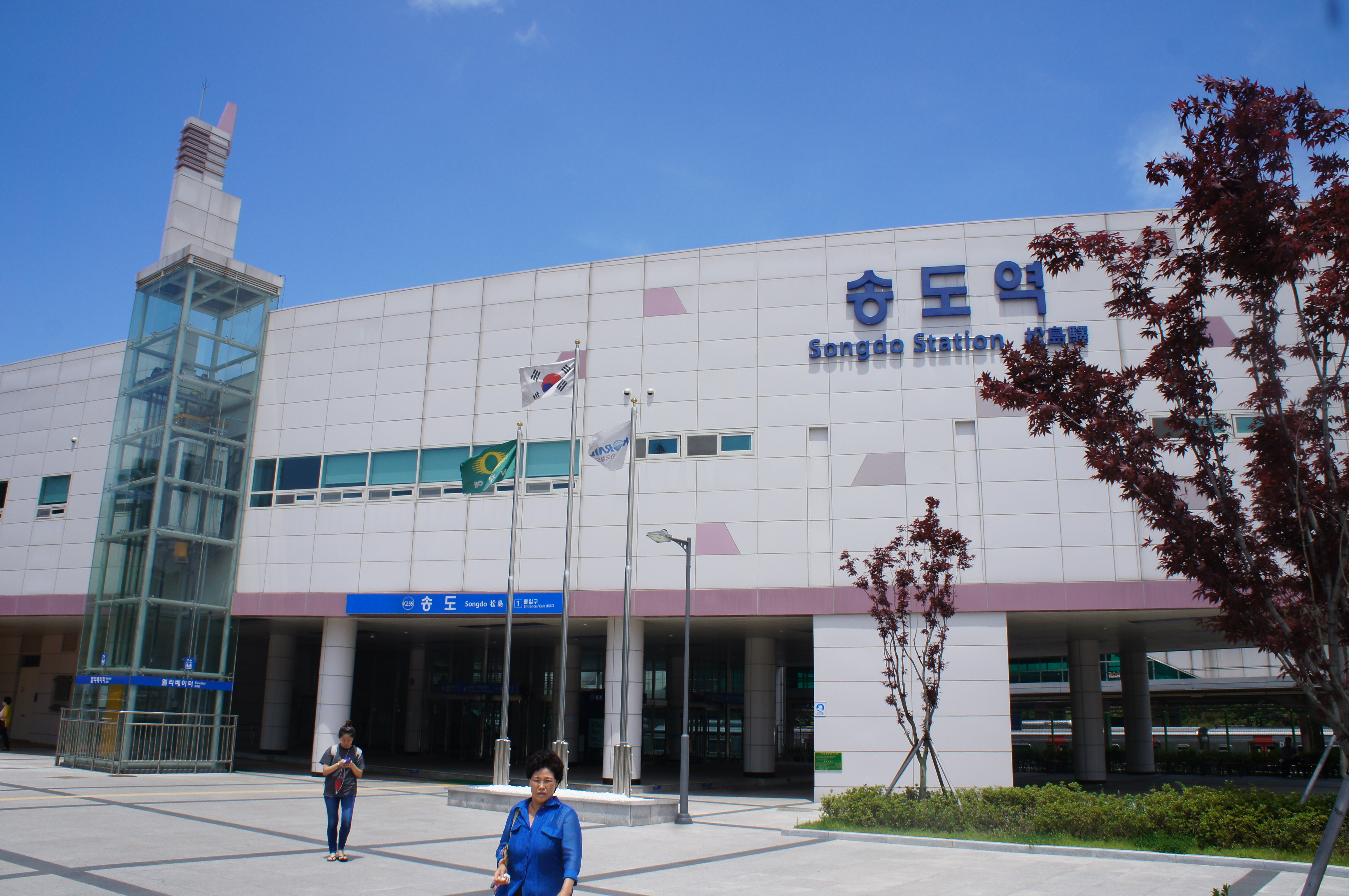 송도역 역사